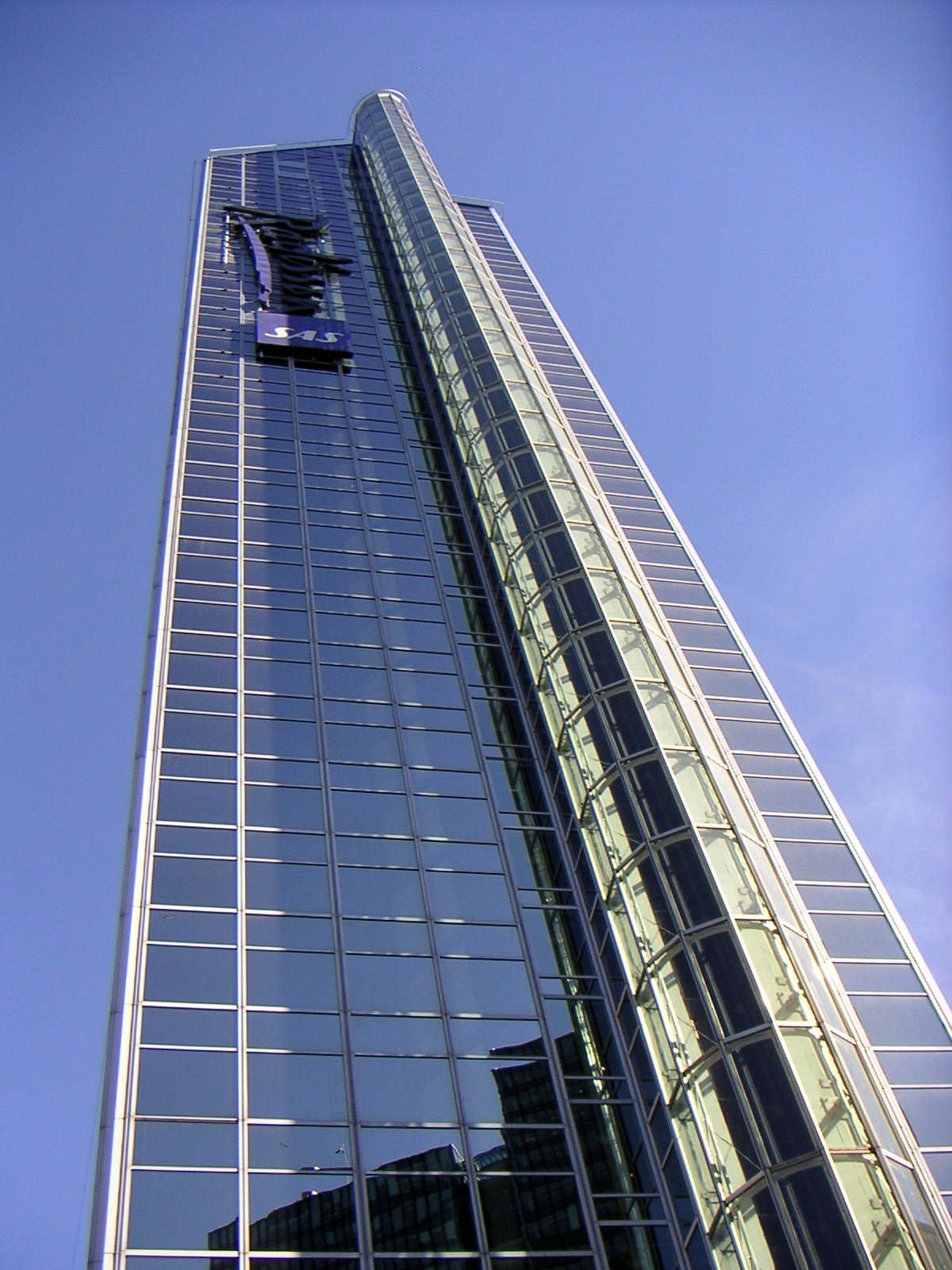 Oslo Plaza